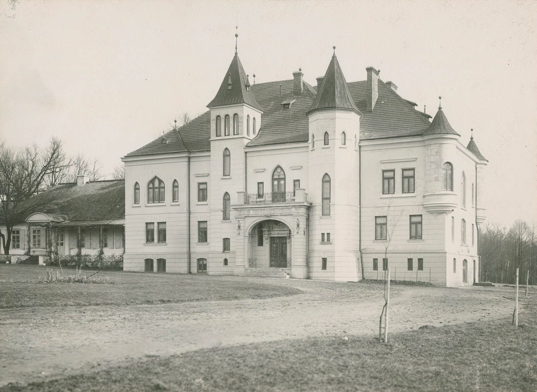 Беларуская (тарашкевіца): Бераставіца Вялікая (Bierastavica Vialikaja), сядзіба Касакоўскіх (Kasakoŭski)